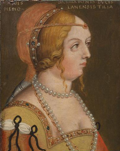 Viridis, Gemahlin v. Leopold III., Tochter Herzog Barnabos Visconti v. Mailand, verheiratet 1365, gestorben in Kloster in Krain um 1414